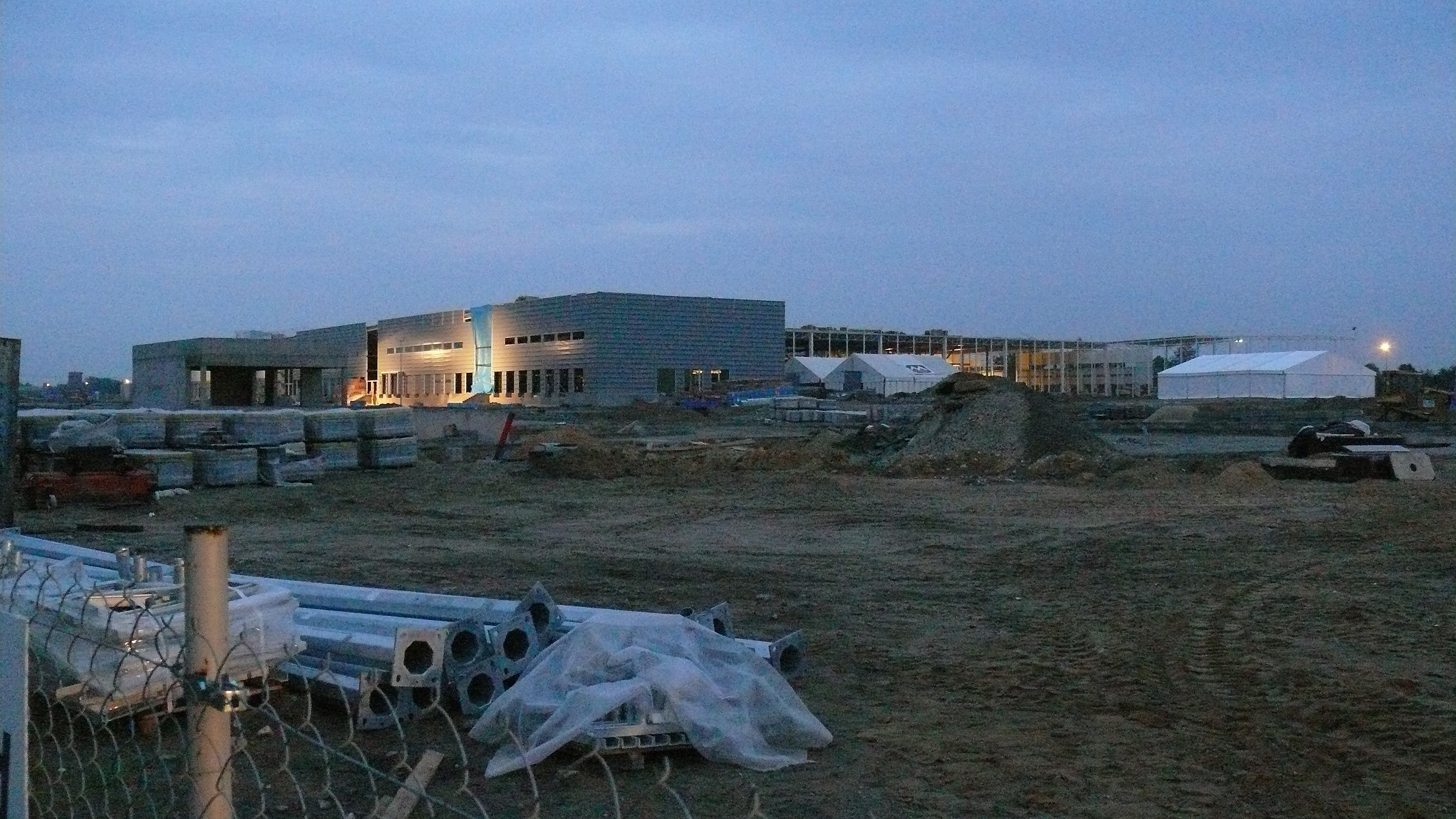 Fabryka Dell w Łodzi, budowa